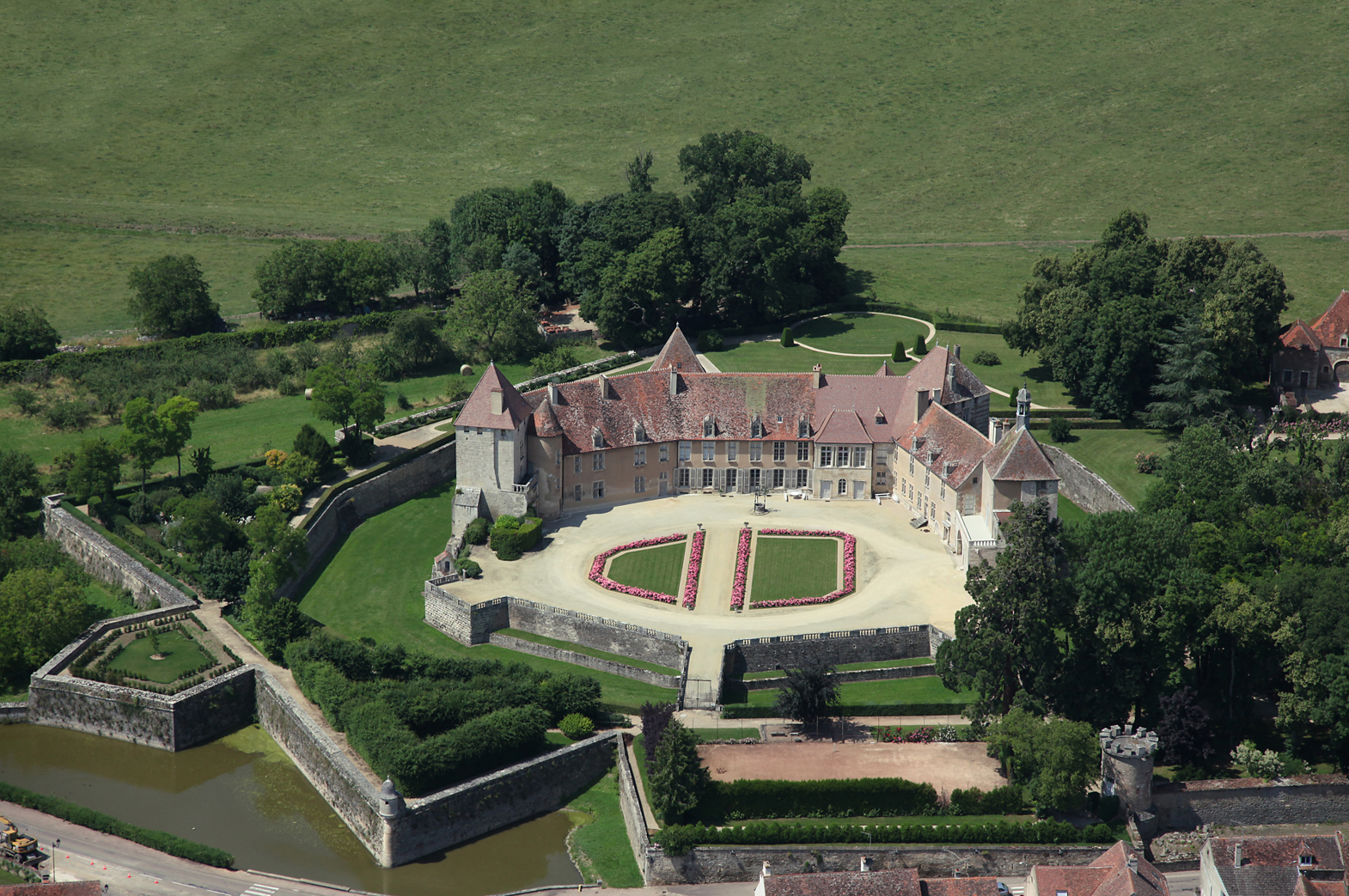 Château d'Epoisses - Vue aérienne